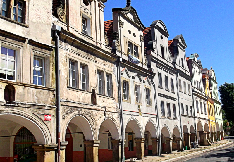 9 domów, XVI Chełmsko Śląskie, Rynek 10, 11, 12, 13, 14, 21, 22, 29, 30, Lubawka 09.1959.